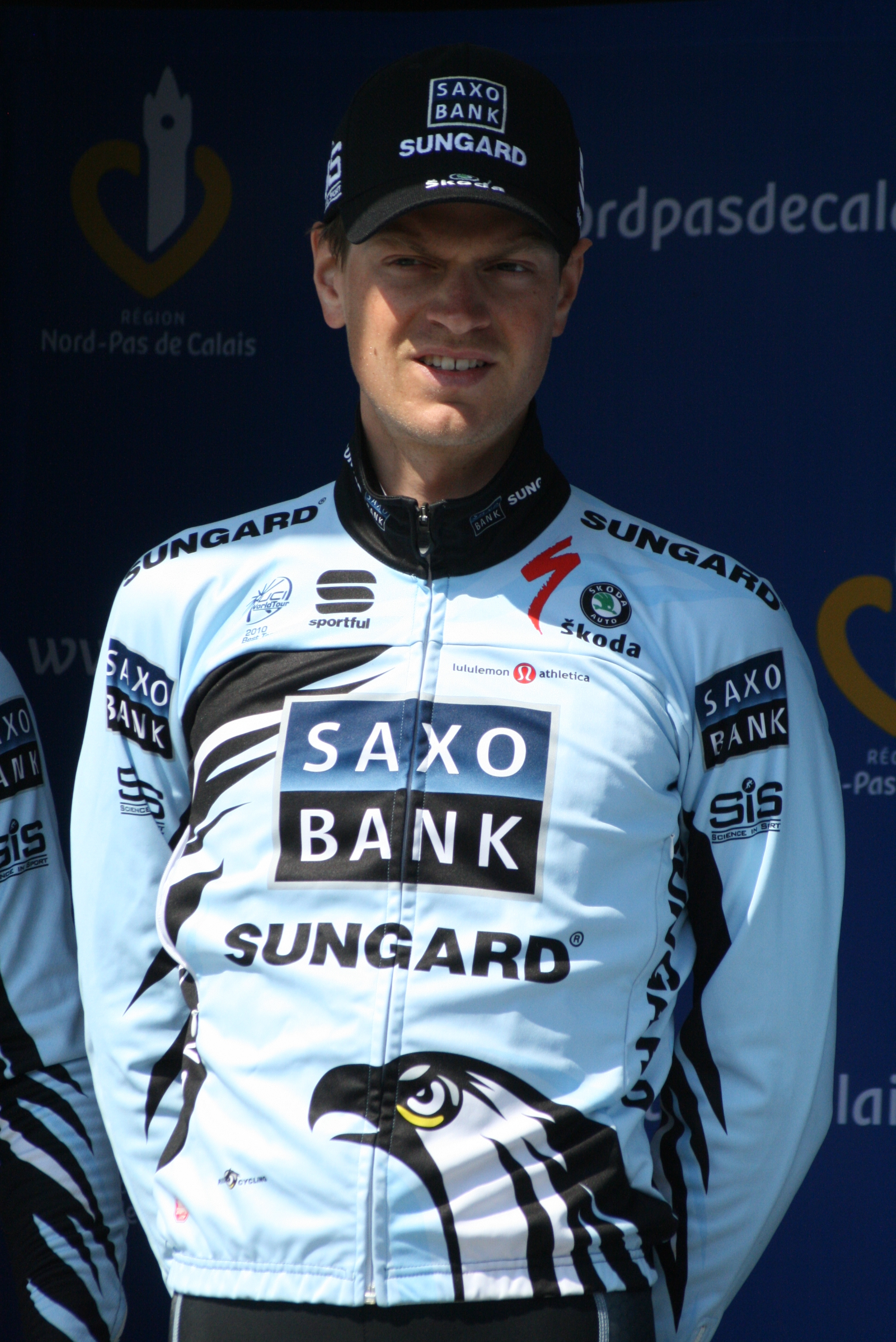 Présentation des coureurs au départ de la première étape Mads Christensen